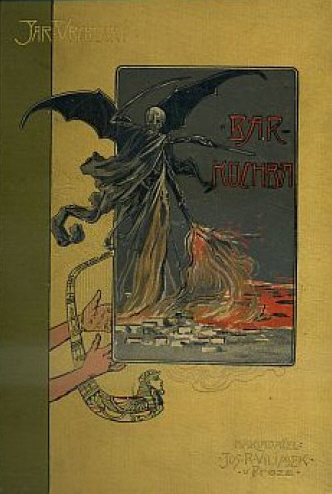 Bar-Kochba, báseň Jaroslava Vrchlického